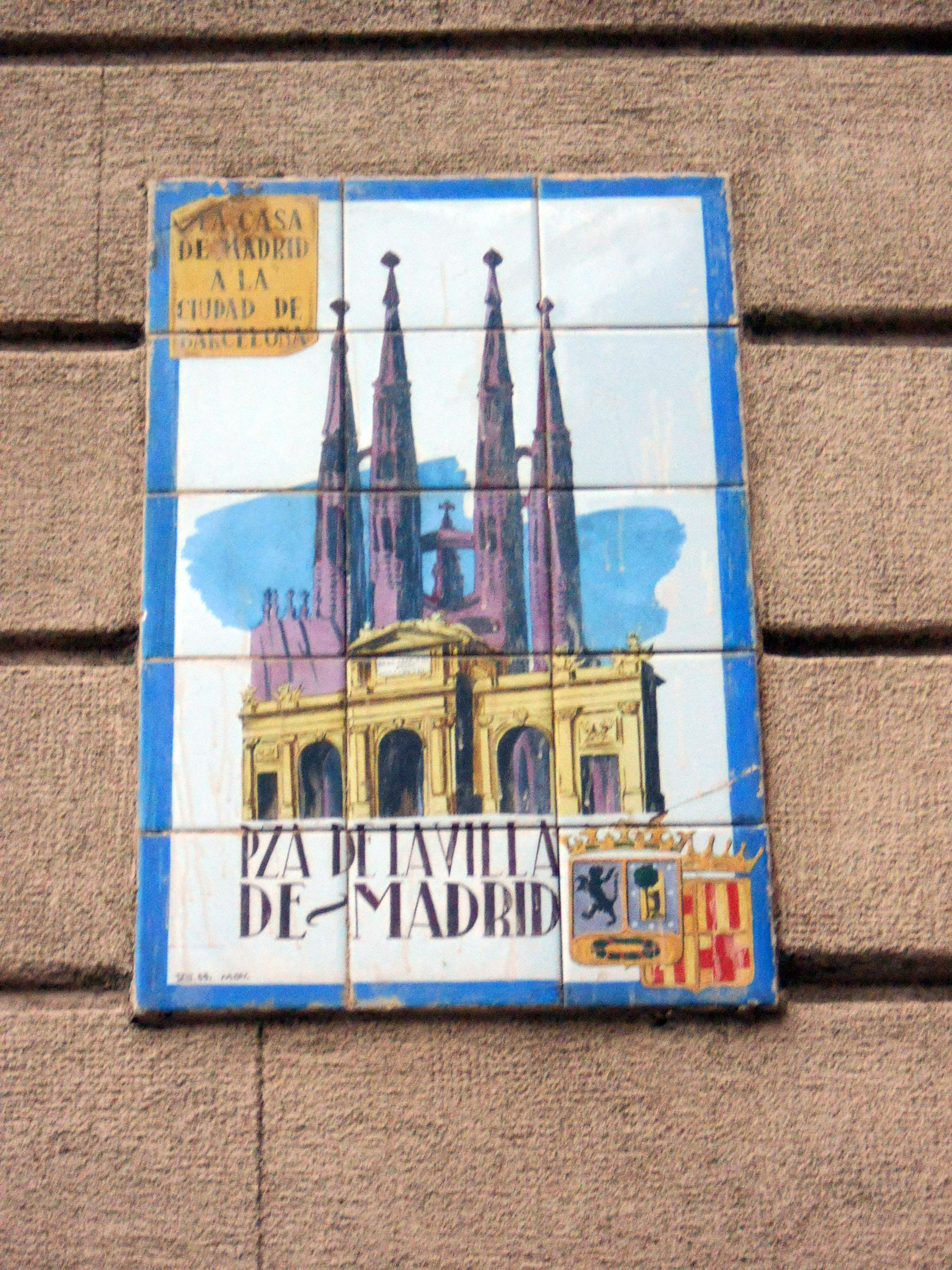 Plaza de la Villa de Madrid.